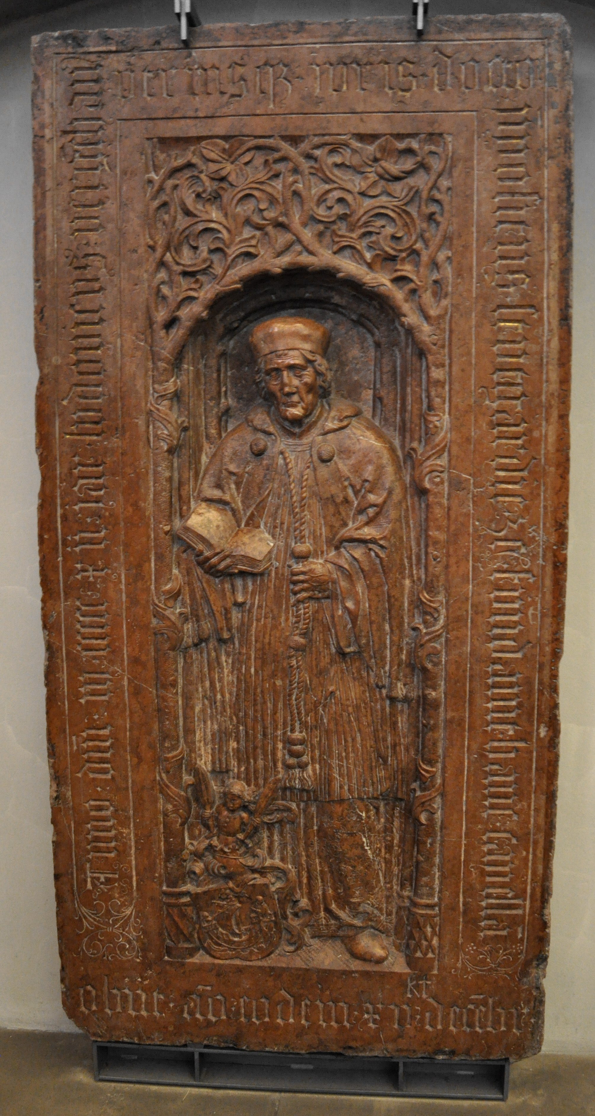 Stuttgart, Stiftskirche, Epitaph des Kanzlers und Stiftspropsts Ludwig Vergenhans († 1512), Bruder des Johannes Nauclerus (eigtl. Vergenhans), aus rotem Marmor; im Chor der Stiftskirche